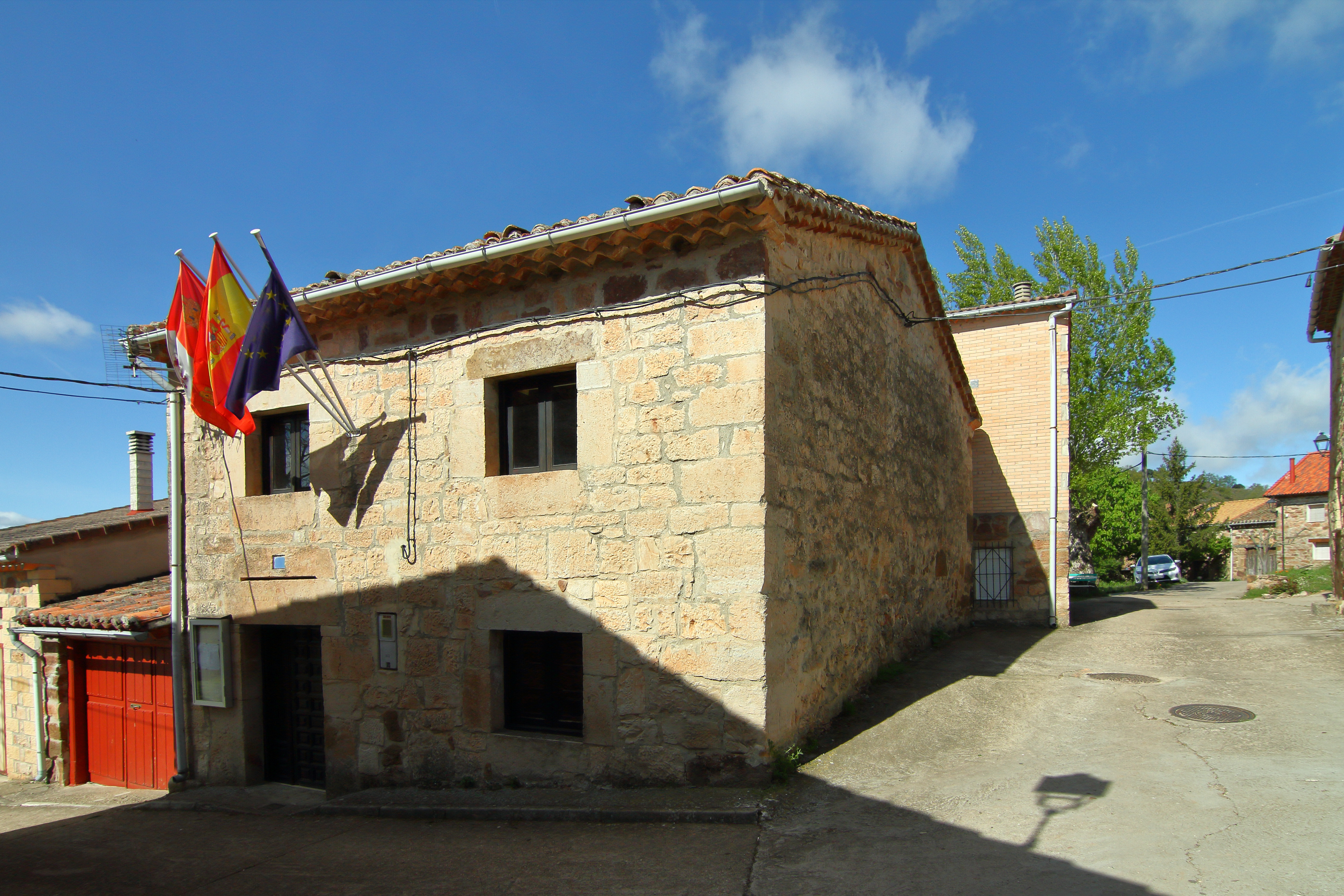 Villoruebo, Casa Cosistorial, 02